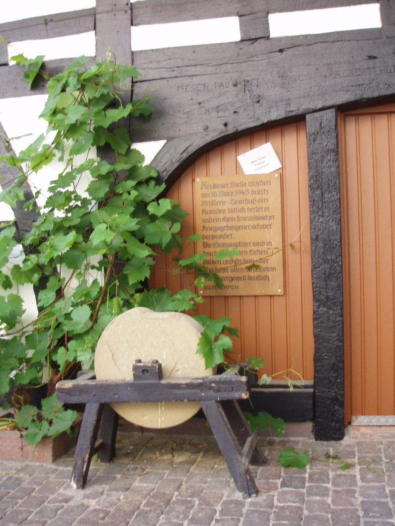 Schleifstein und Fachwerkbalken, in denen sich laut Hinweisschild noch Granatsplitter befinden, die 1945 hier einen Menschen töteten und einen verletzten.